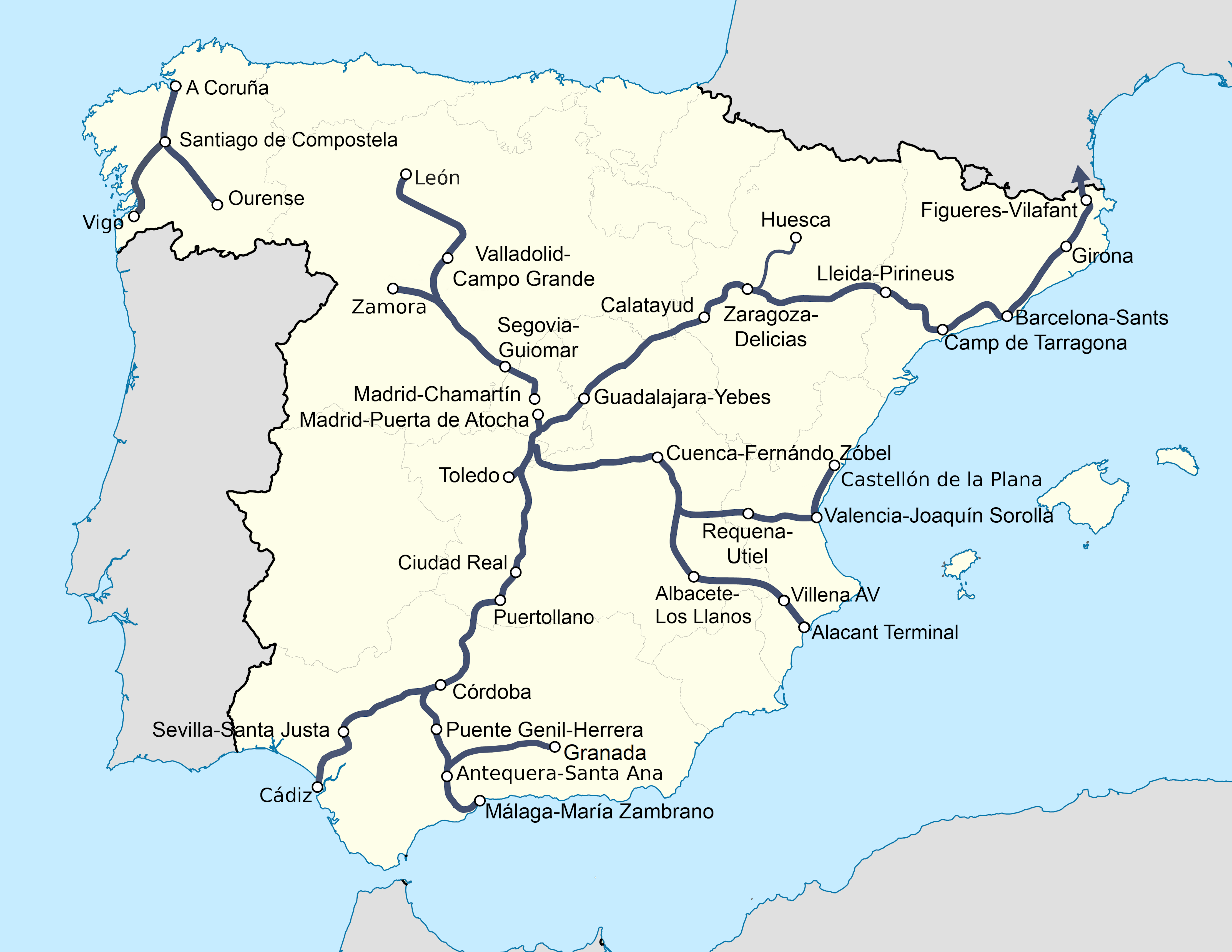 Red española de alta velocidad en 2019.